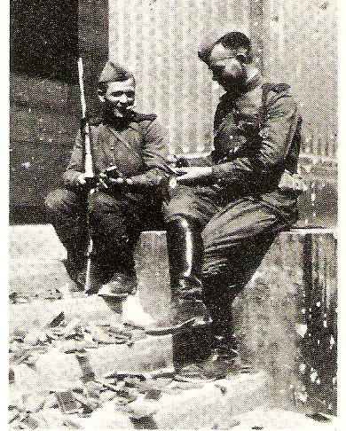 SOldati sovietic seduti all'ingresso della Nuova Cancelleria di Berlino, raccolgono le croci di ferro tedesche sparse sui gradini